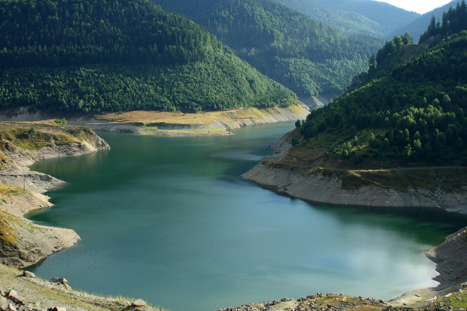 Lacul de acumulare Gura Apei, Romania